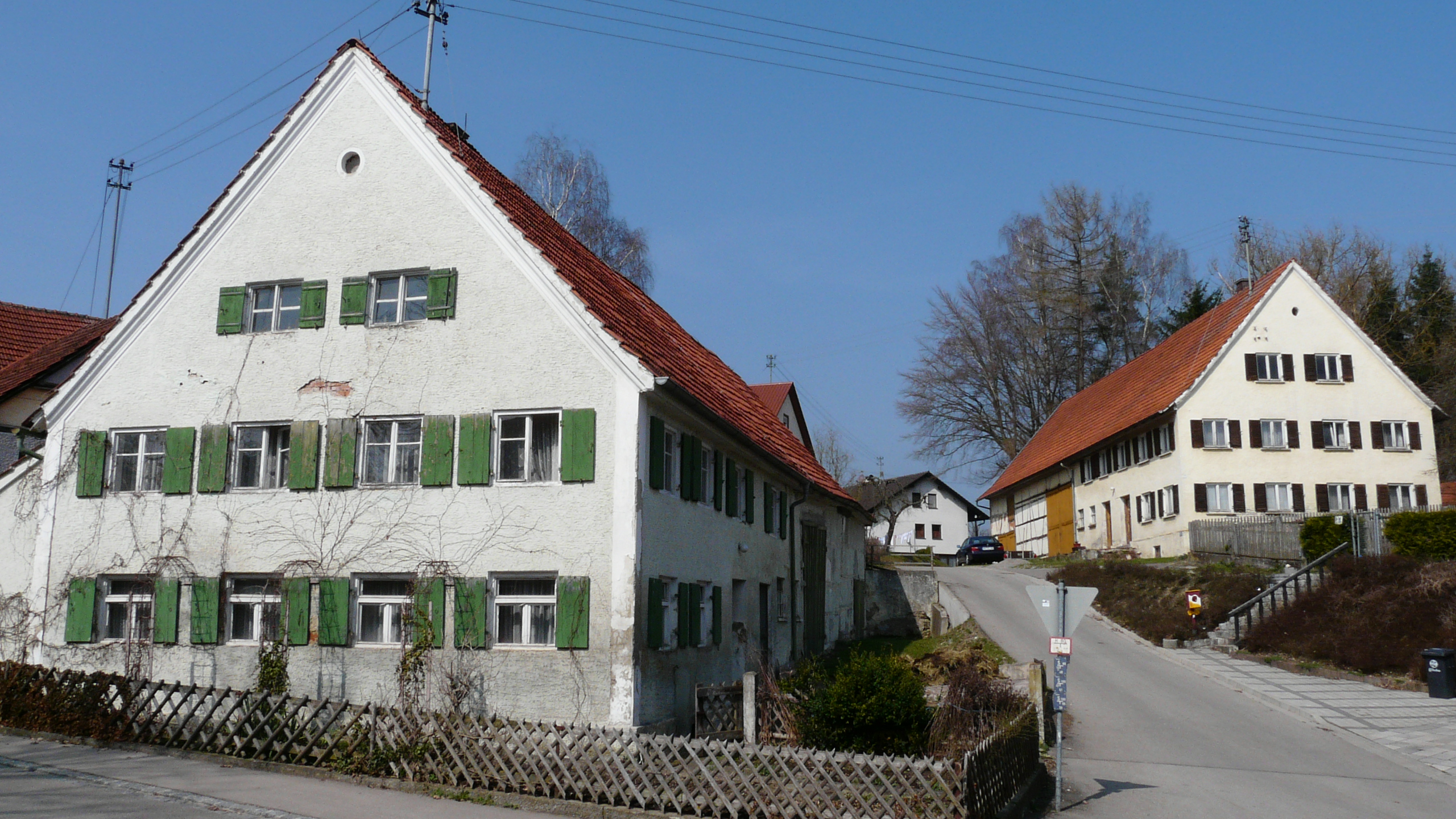 Tagobertstr. in Tafertshofen, Kettershausen